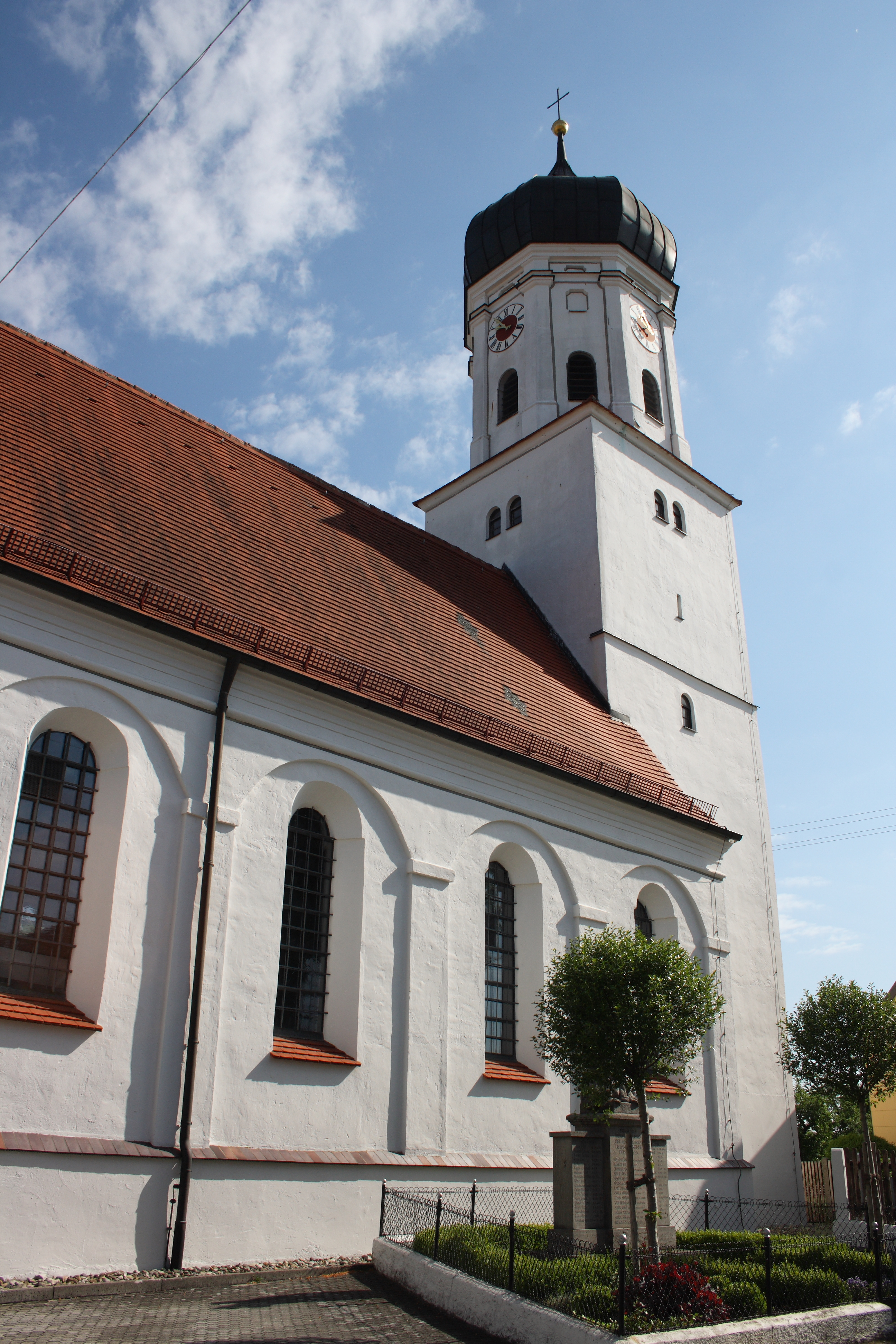 Katholische Pfarrkirche St. Nikolaus in Deisenhofen, einem Stadtteil von Höchstädt an der Donau im Landkreis Dillingen an der Donau (Bayern), Chorturmkirche (15./18. Jahrhundert), unterer Teil des Turmes aus dem 15. Jahrhundert, oktogonaler Aufbau mit Zwiebelhaube von 1710